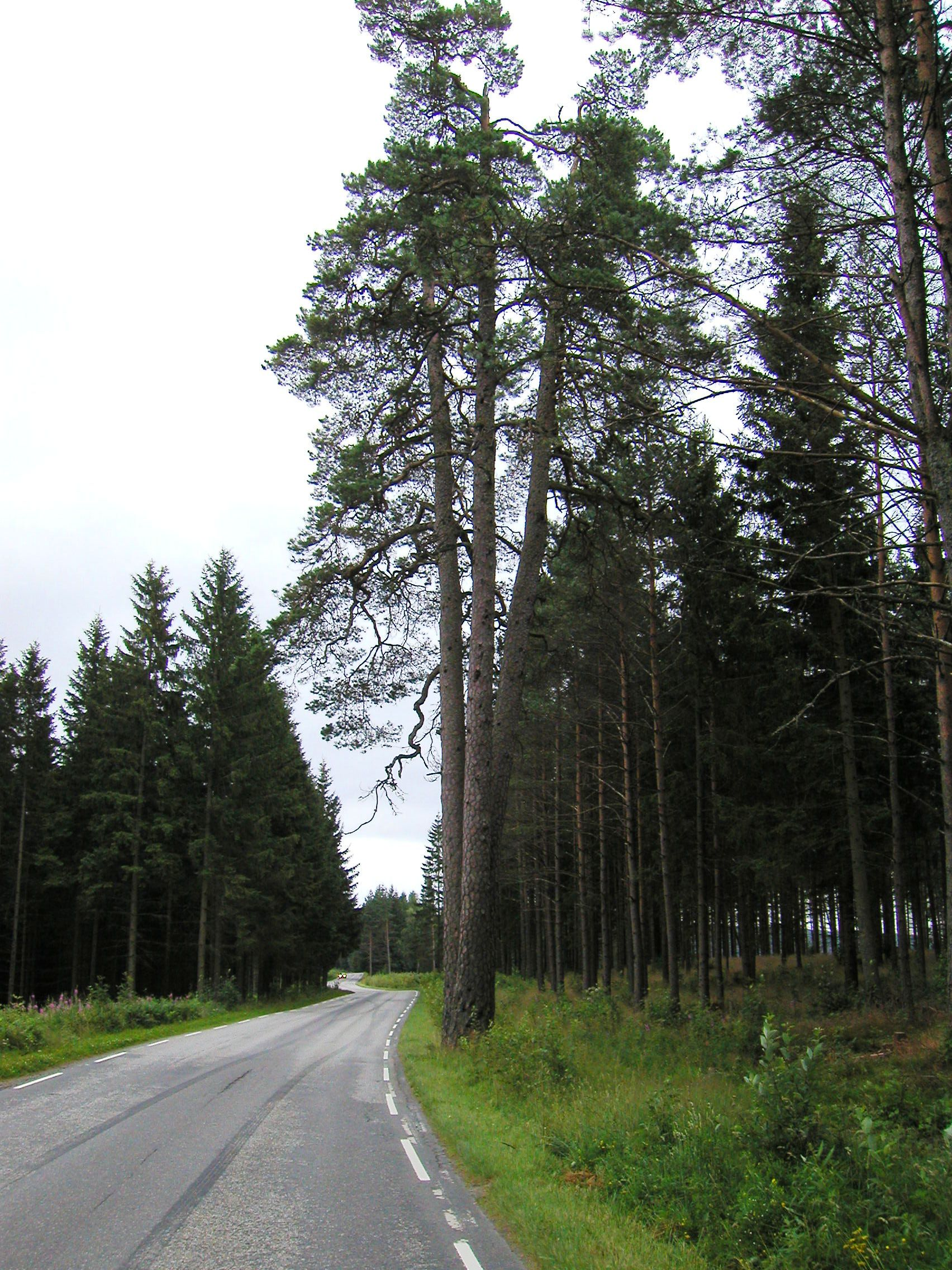 "De tre furuer" ved Raveien nær Rokke kirke nord for Halden